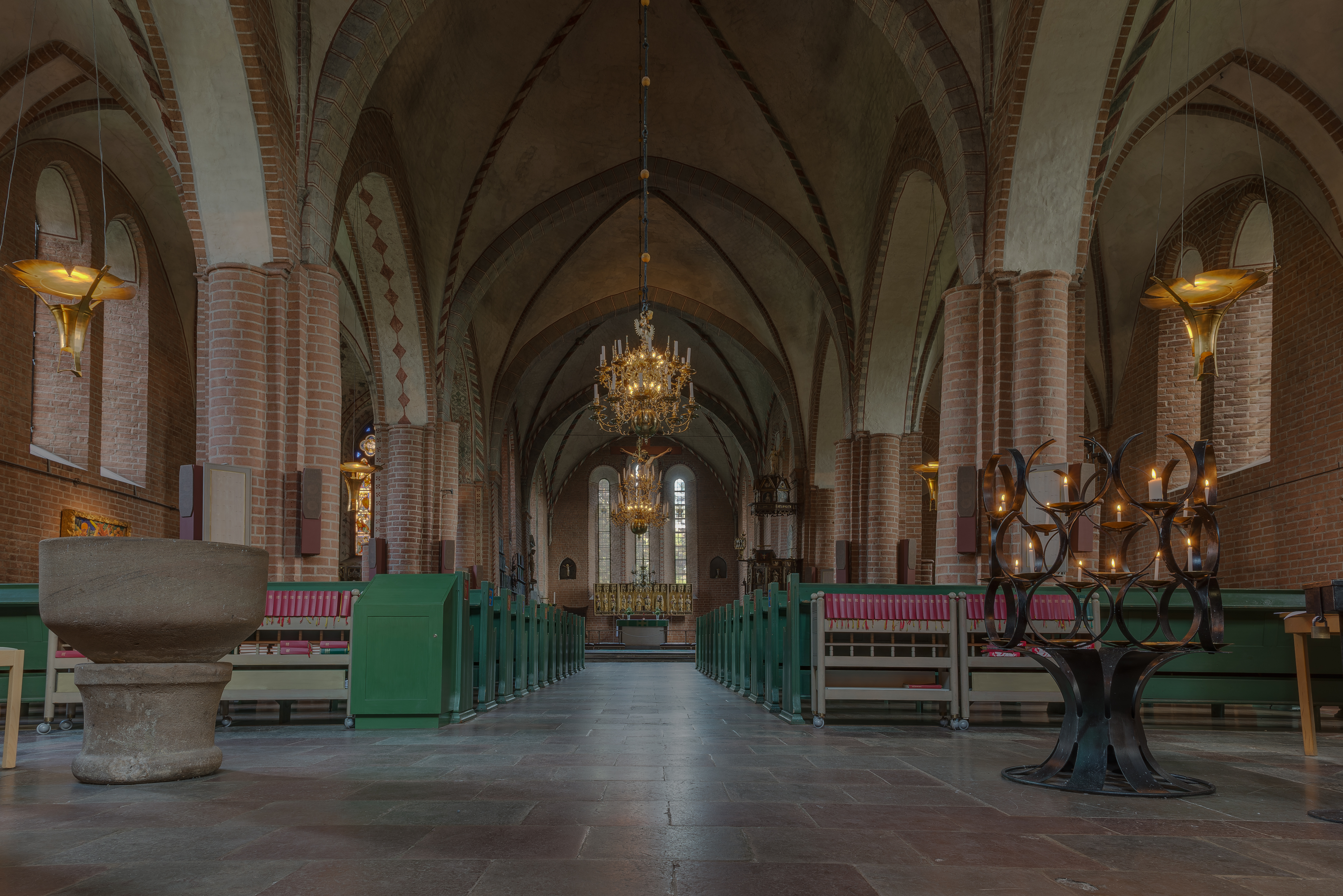 Interiör, Mariakyrkan (Sigtuna 2:41)